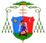 Alba Iulia catholic archidiecesis